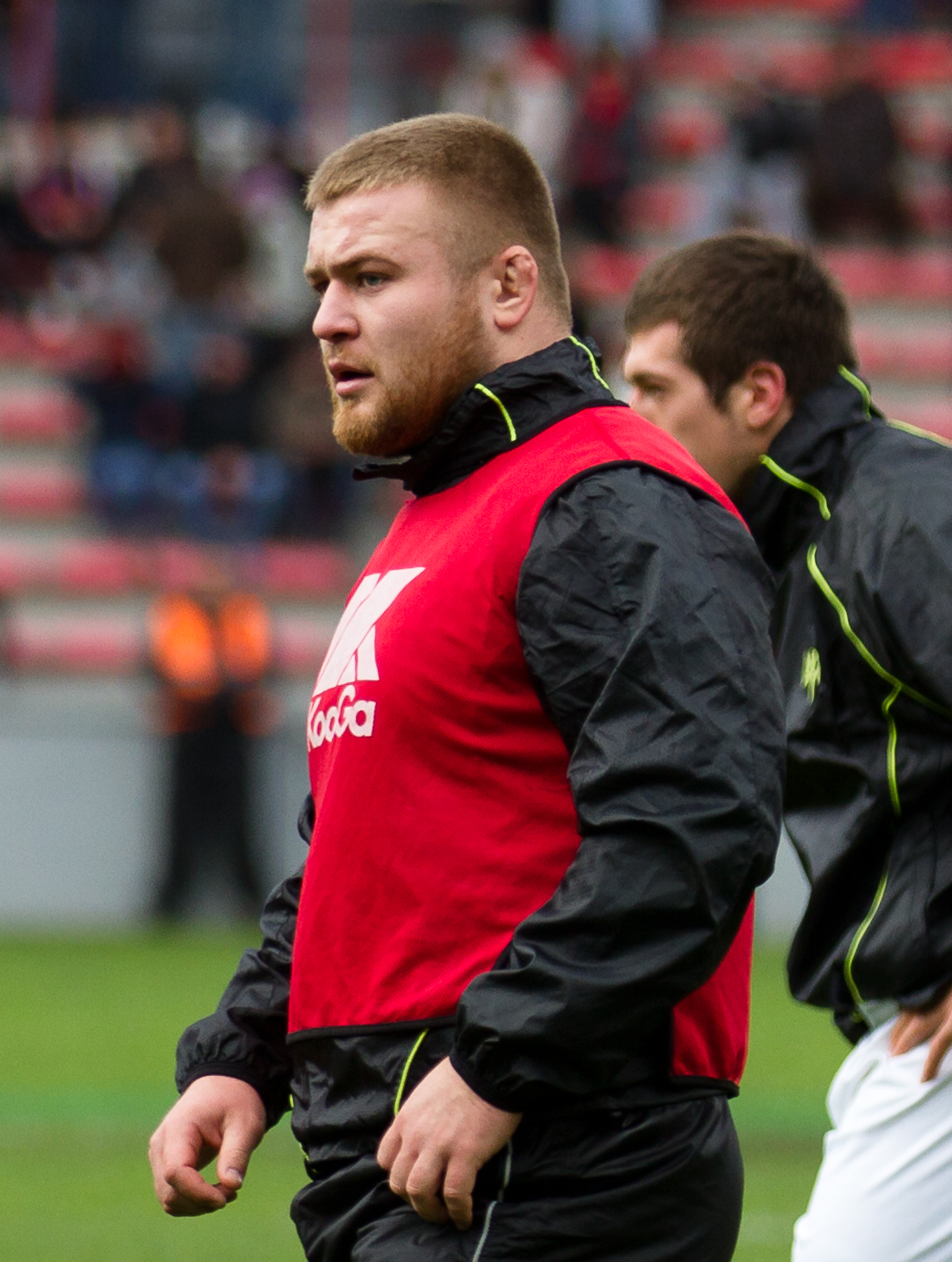 Heineken Cup 2012-2013 — 8 décembre 2012, Stade Ernest Wallon. Match between: Stade toulousain — Ospreys